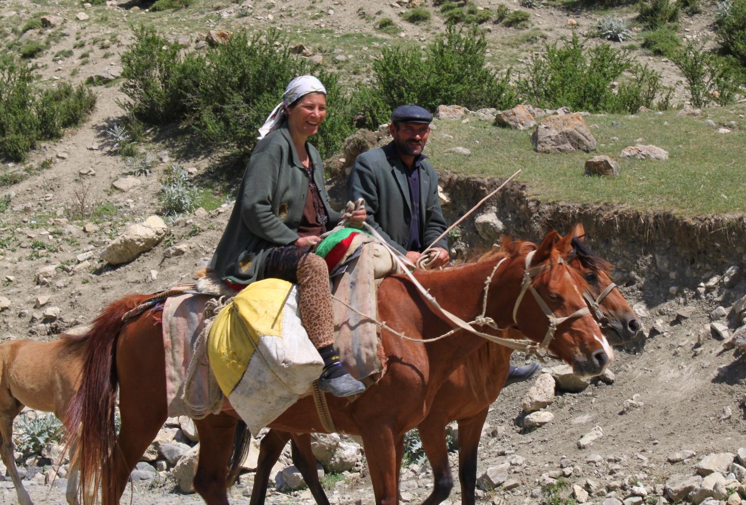 Азим и Махбуба Новрузовы жильцы села Хыналыг Губинского района Азербайджана.